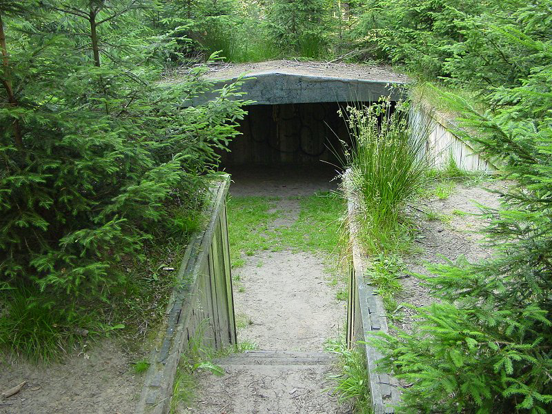 Onderduikershol in Valthe (The Netherlands)